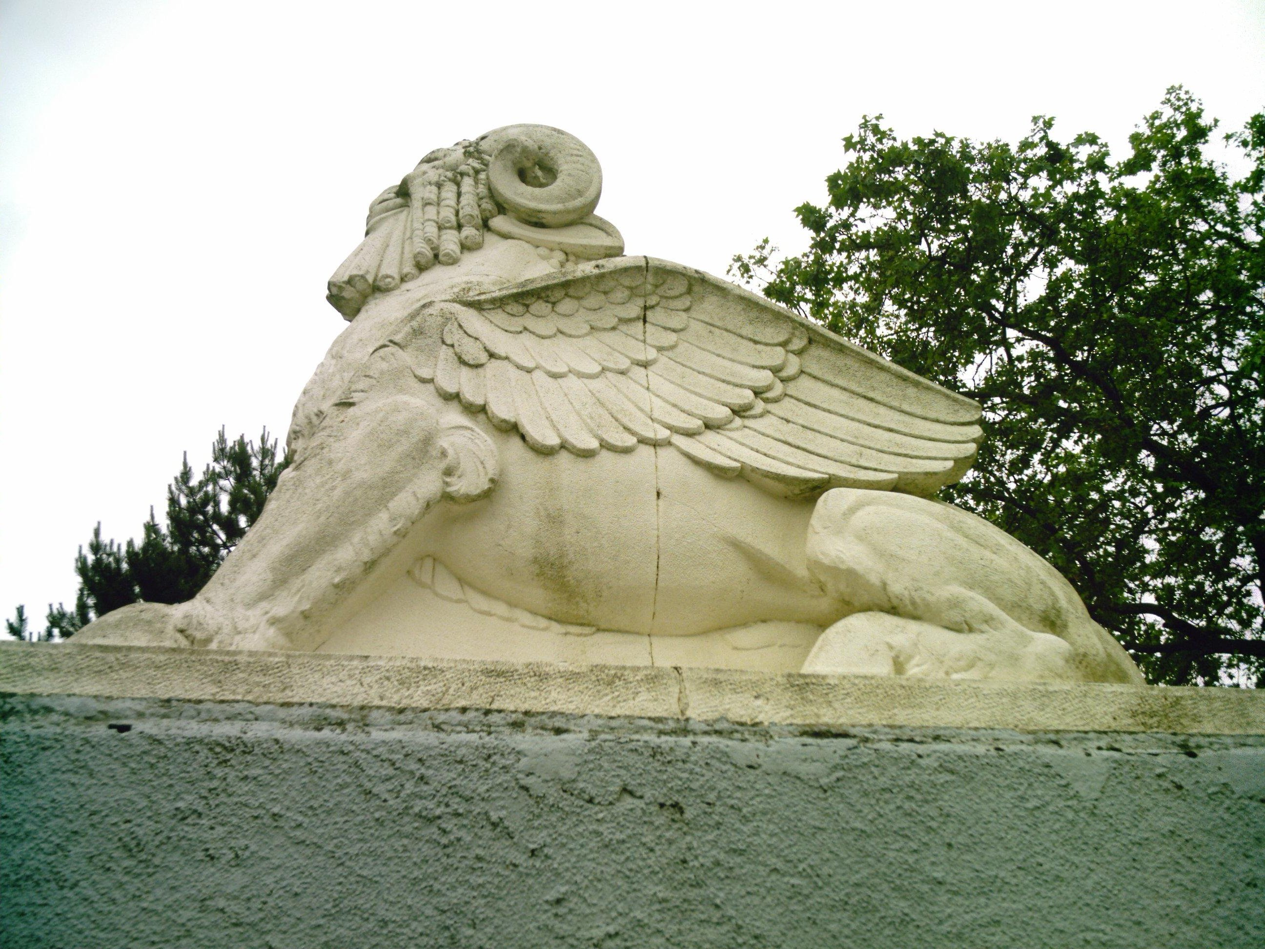 Une des quatre statues présentes aux quatre coins du vélodrome du Parc de la Tête d'Or de Lyon.